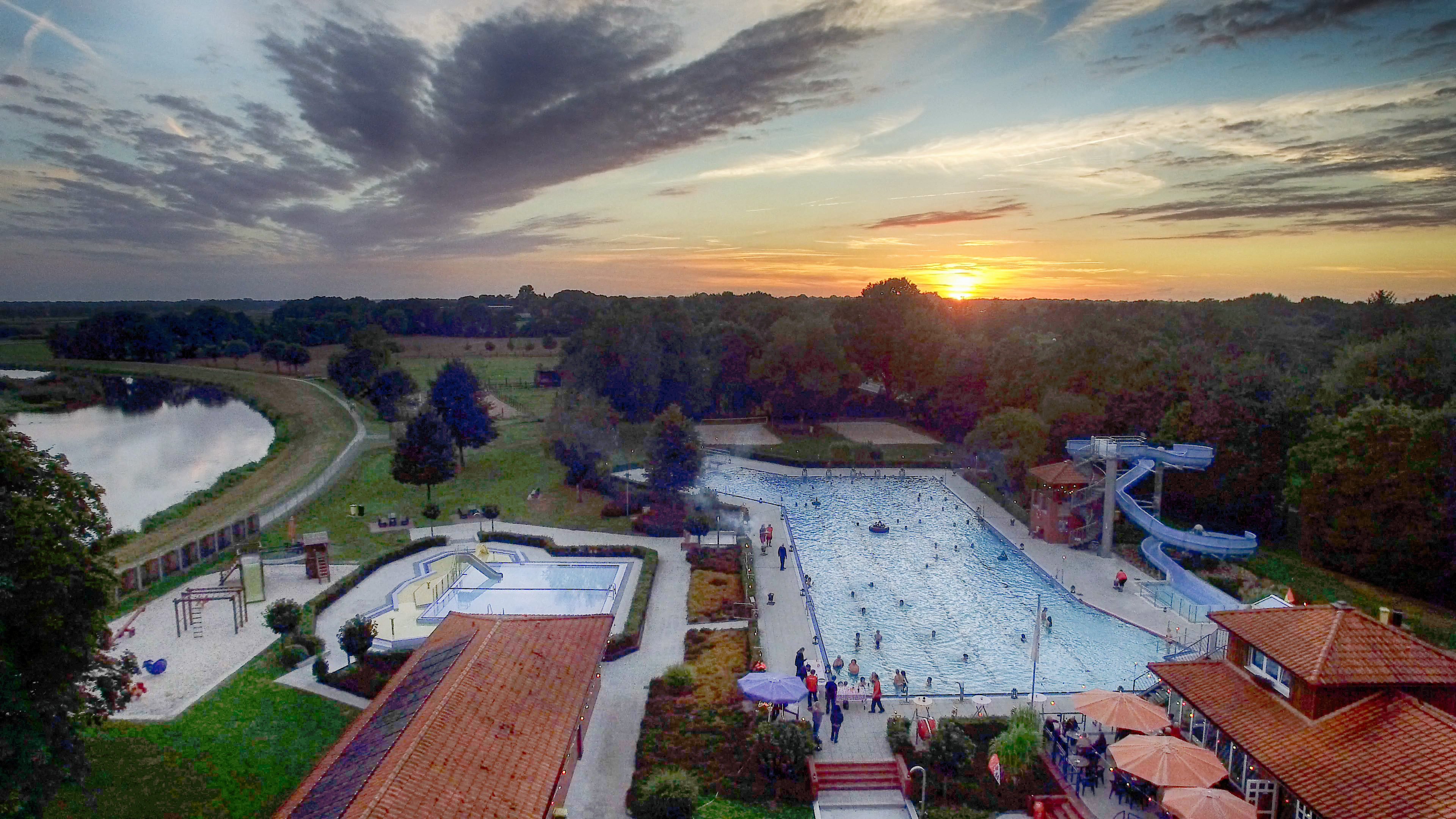 Das Freibad Hengstforde der Gemeinde Apen bei Dämmerung